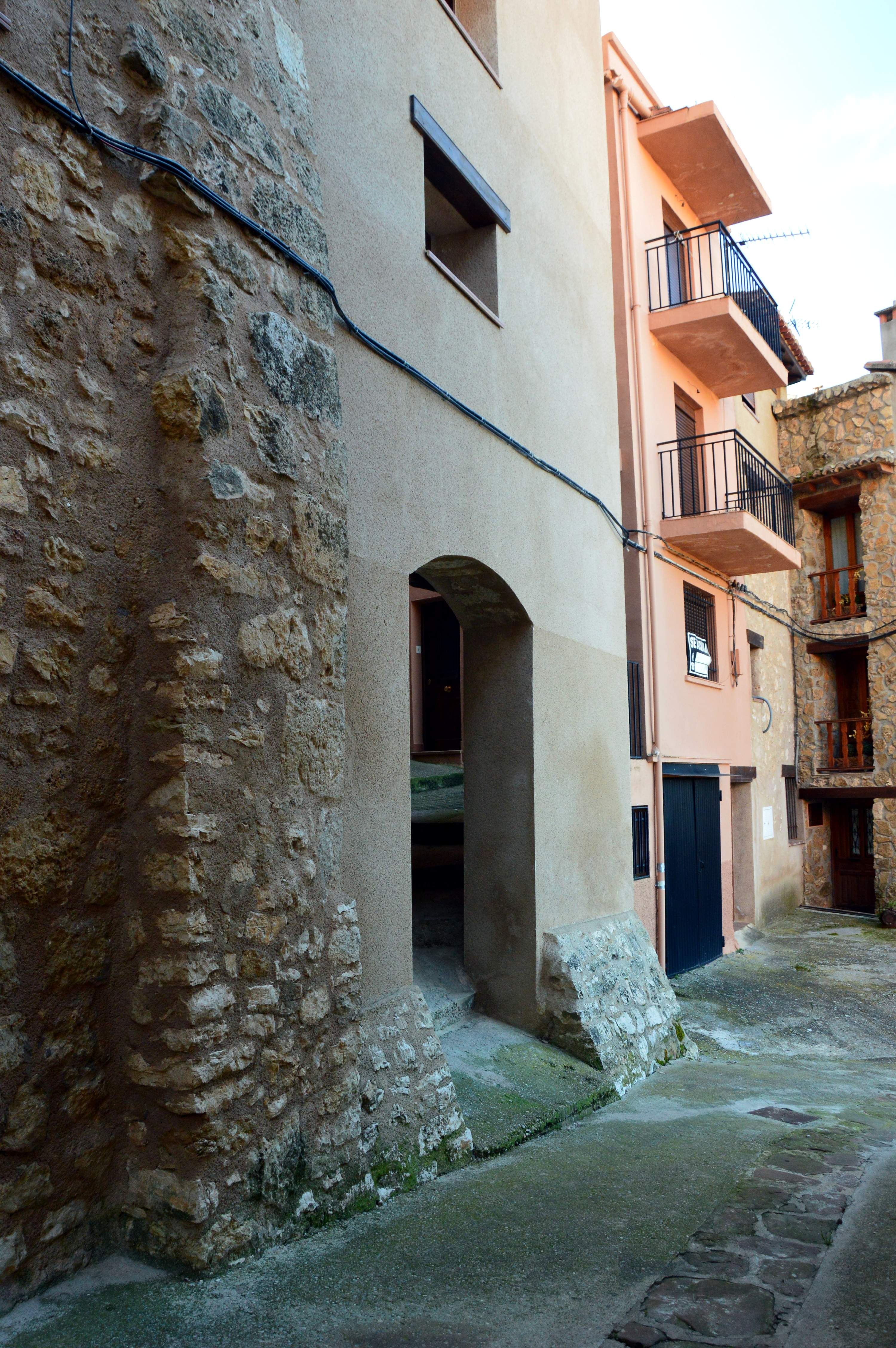 Arco y callejón bajo la Casa Consistorial de Castielfabib (Valencia), con detalle de muro y contrafuerte correspondiente al paño de muralla de la calle Barrioso (2018).